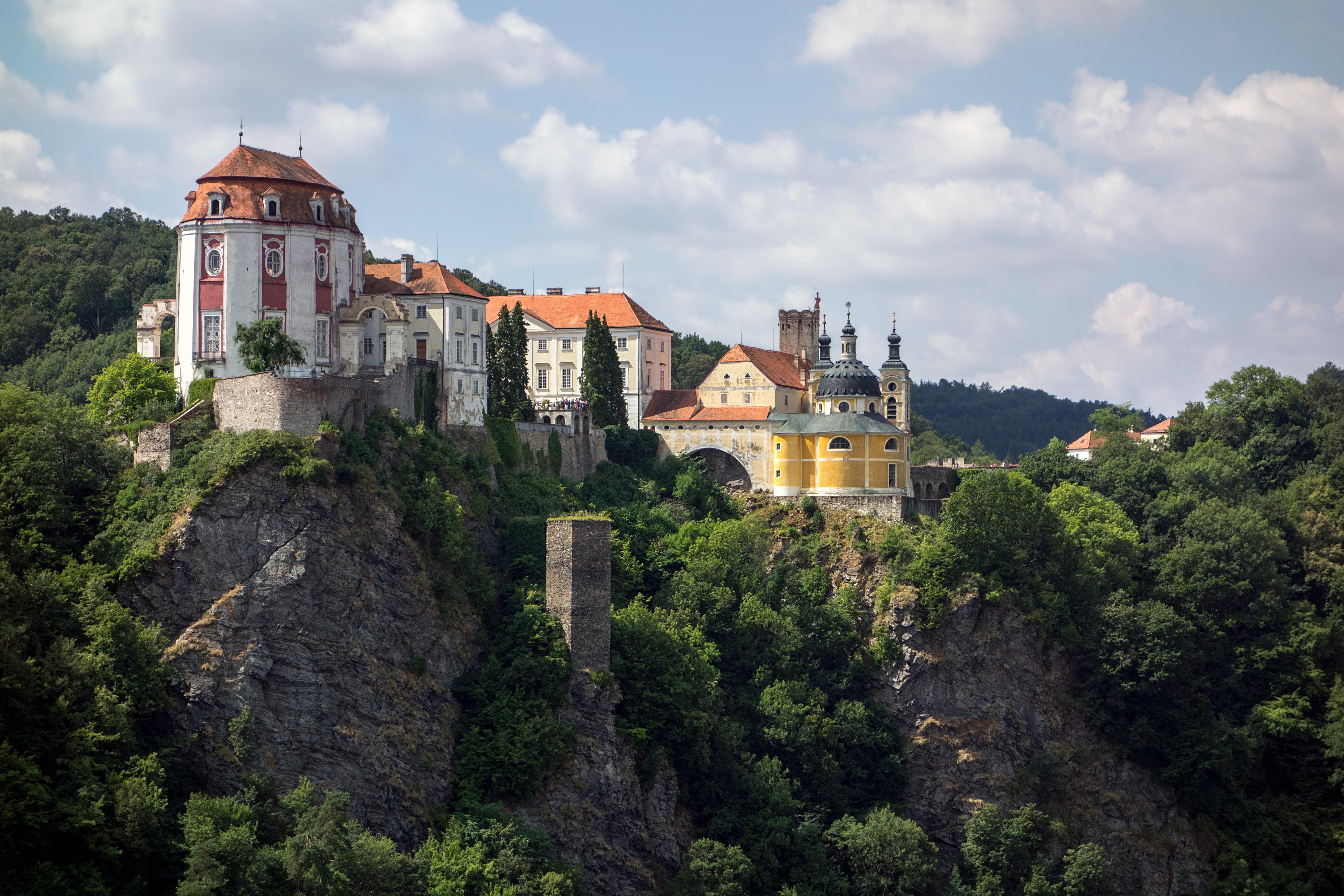 Vranov nad Dyjí, Castle